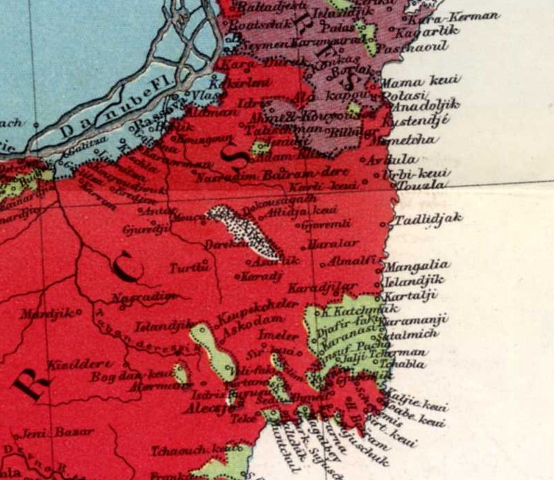 Imaginea este un fragment din aceasta harta.